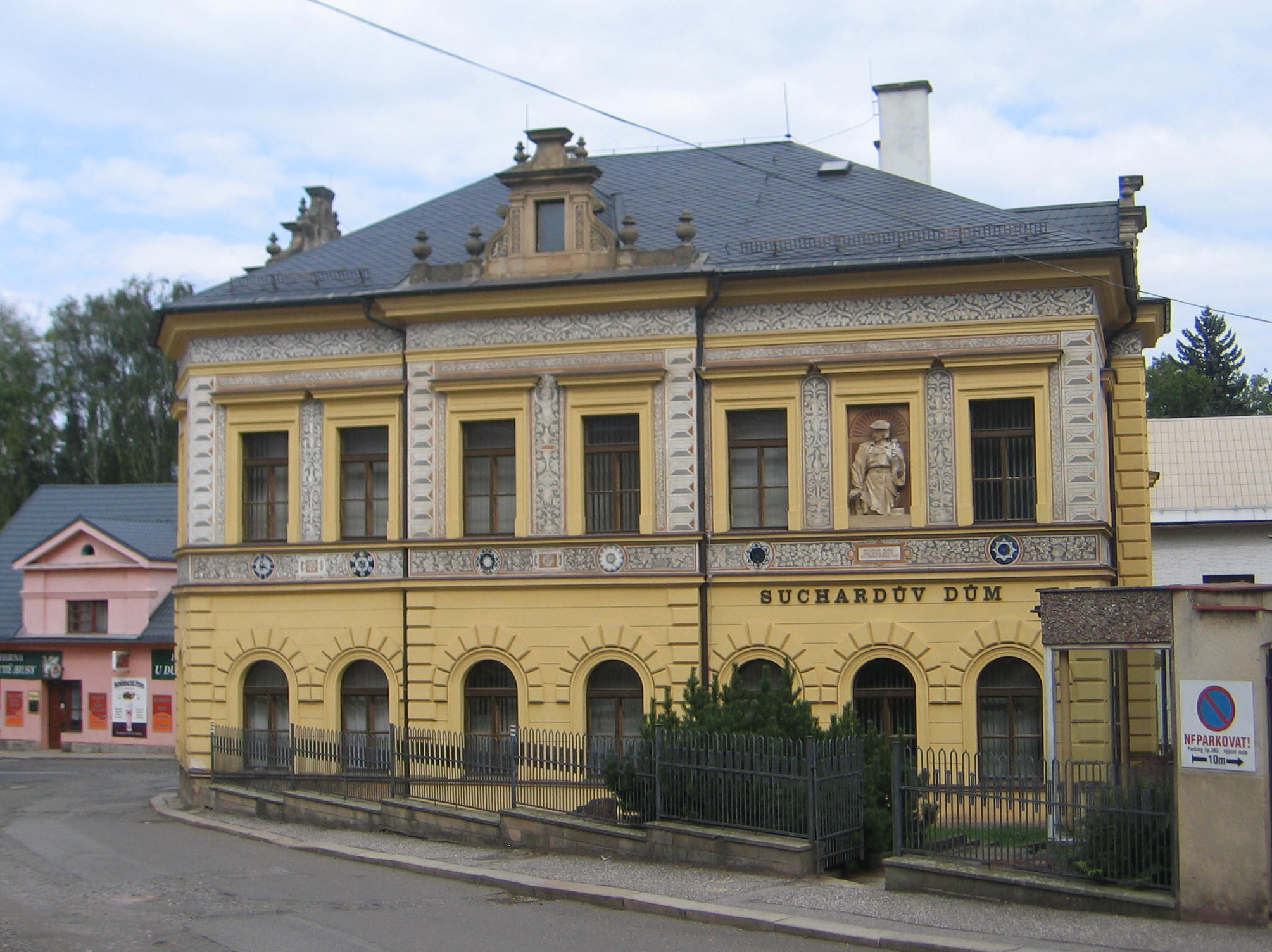 Muzeum - Suchardův dům (Nová Paka), St. Suchardy 68, Nová Paka